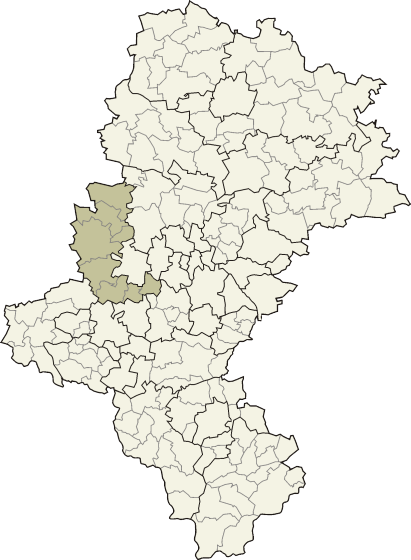 Powiat gliwicki w województwie śląskim